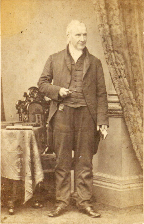 William Miller carte de visite